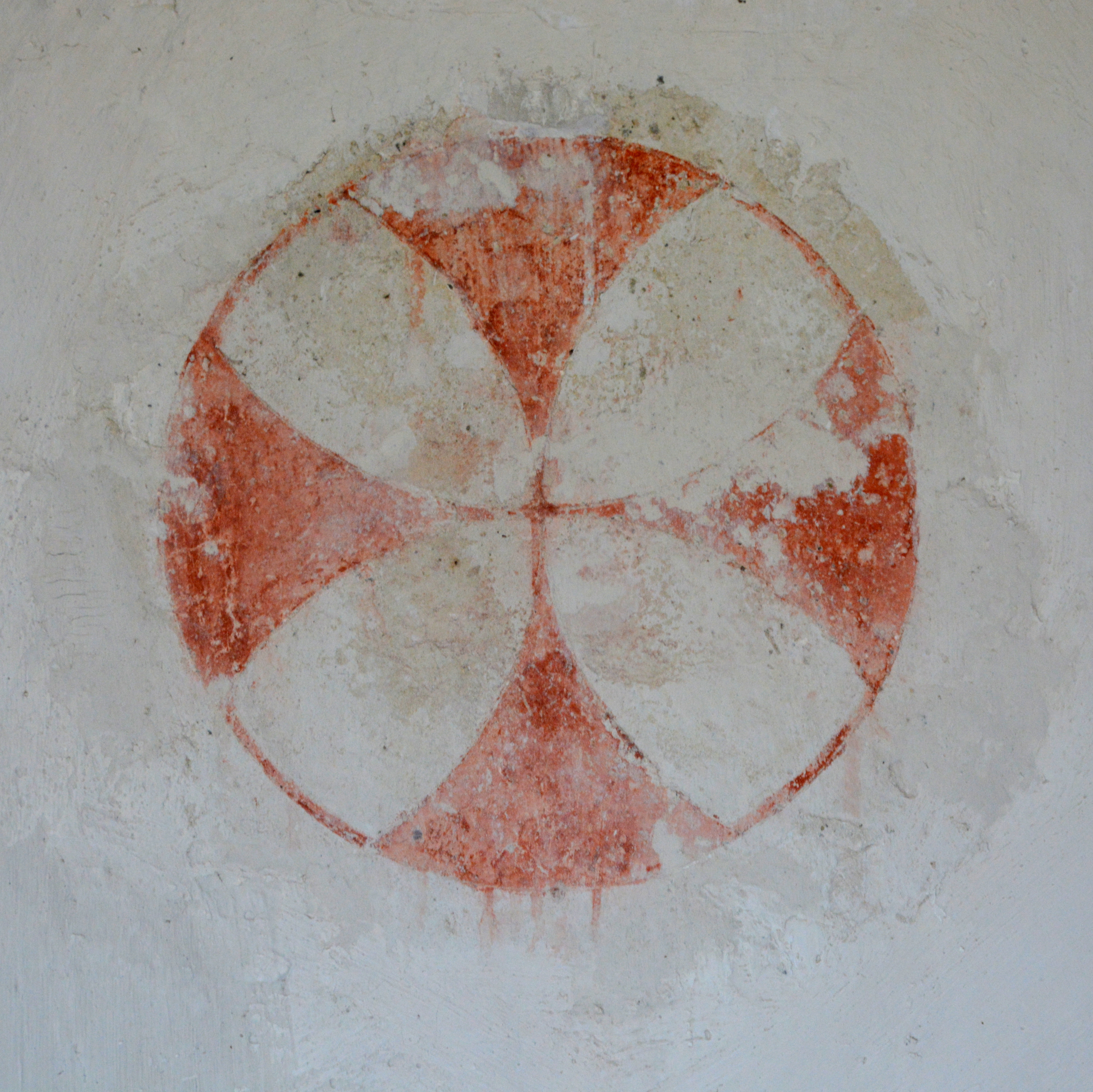 Boksum, Sint-Margrietkerk, wijdingskruis noordelijke muur